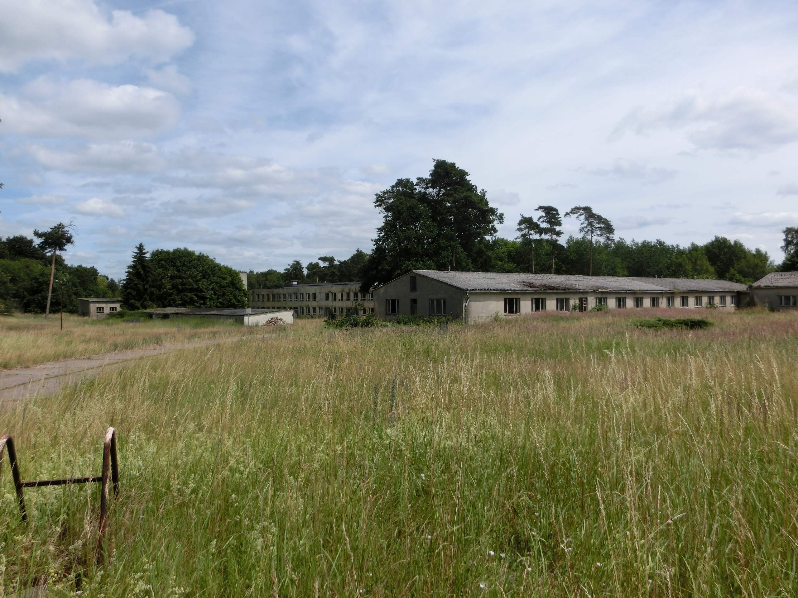 Ehemalige NVA-Kaserne in Goldberg (Mecklenburg)